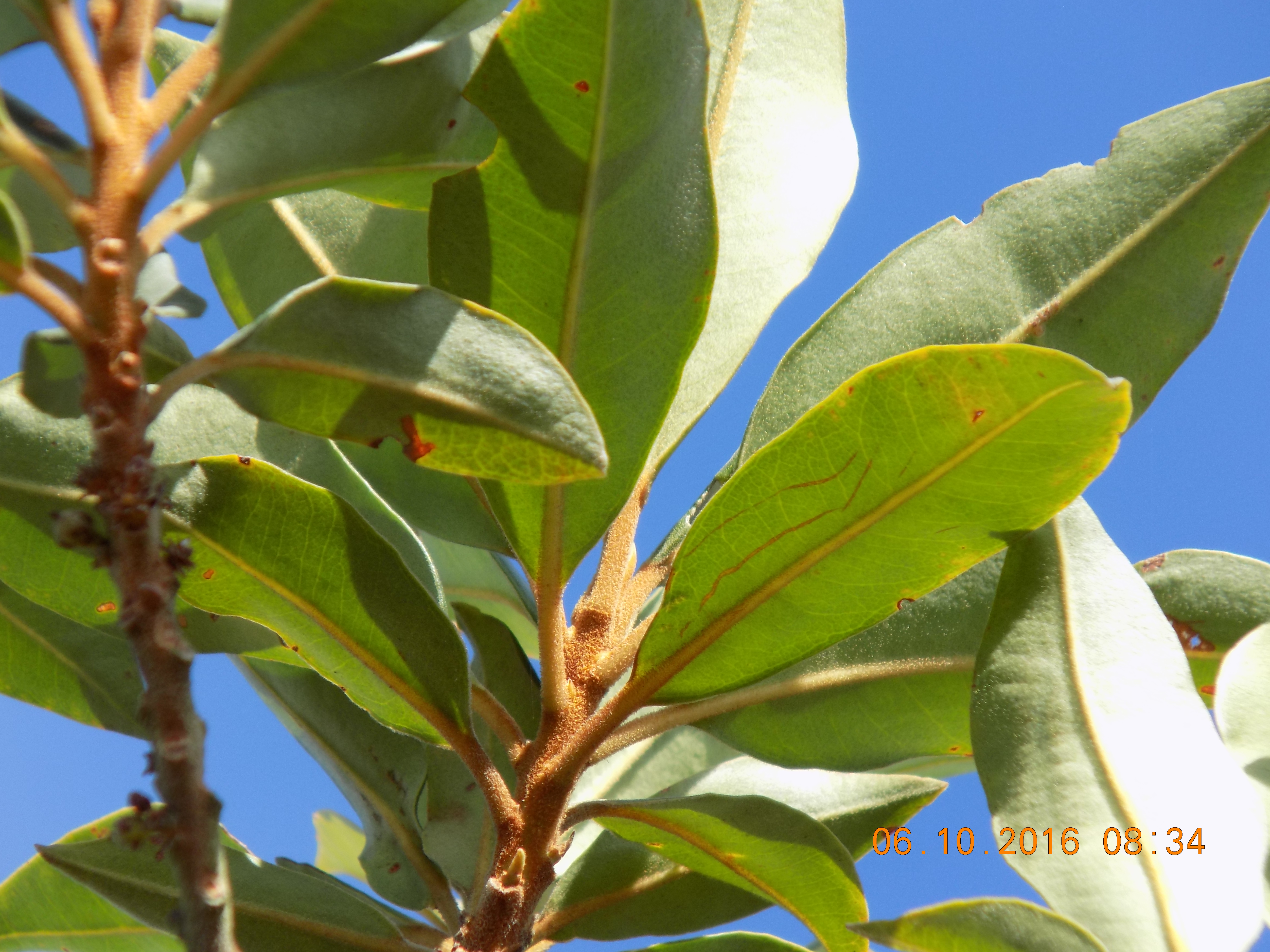 Detalles de filotaxia de Myrsine coriacea.